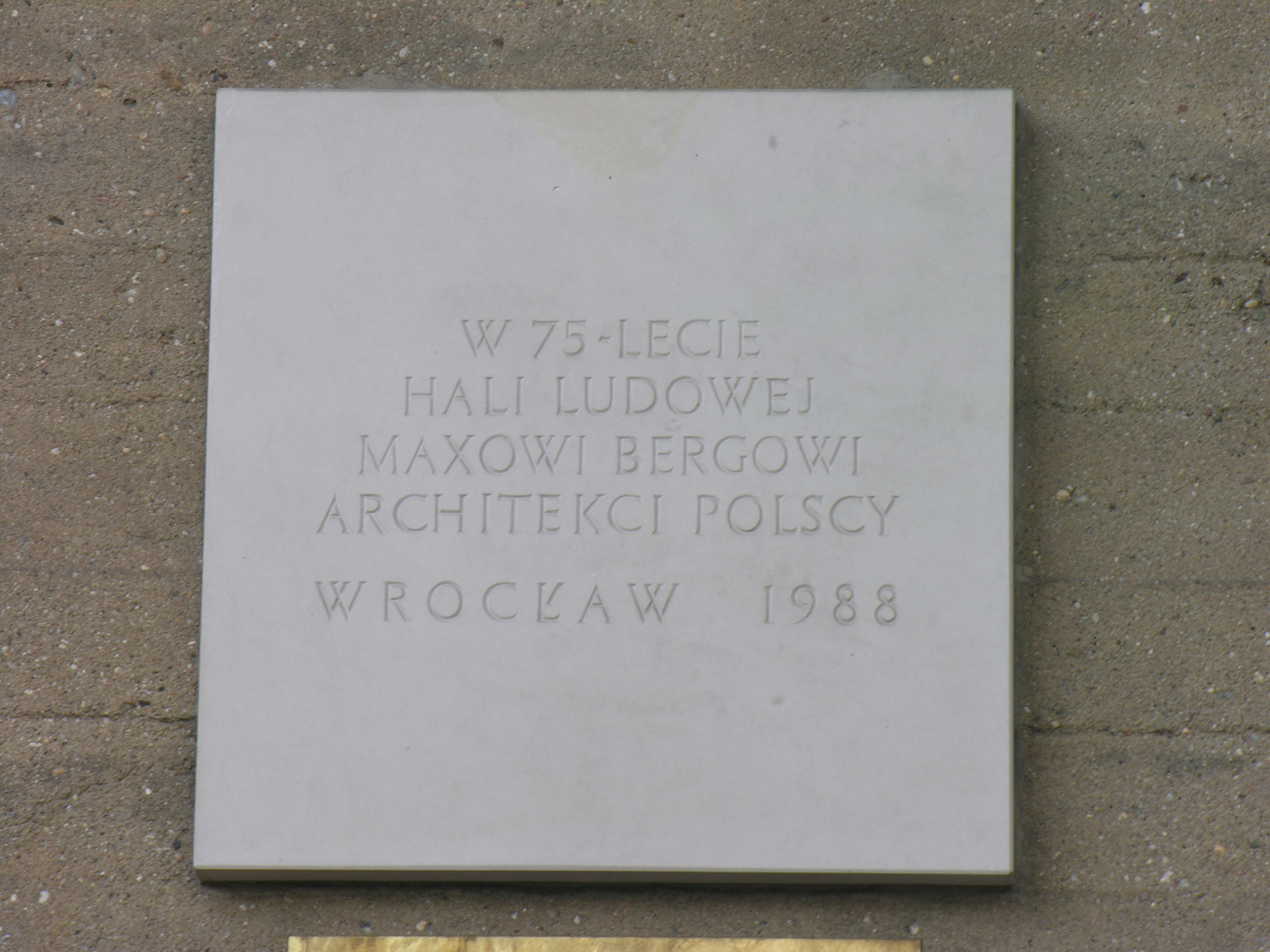 Tablica ku czci maxa Berga na Hali Stulecia we Wrocławiu